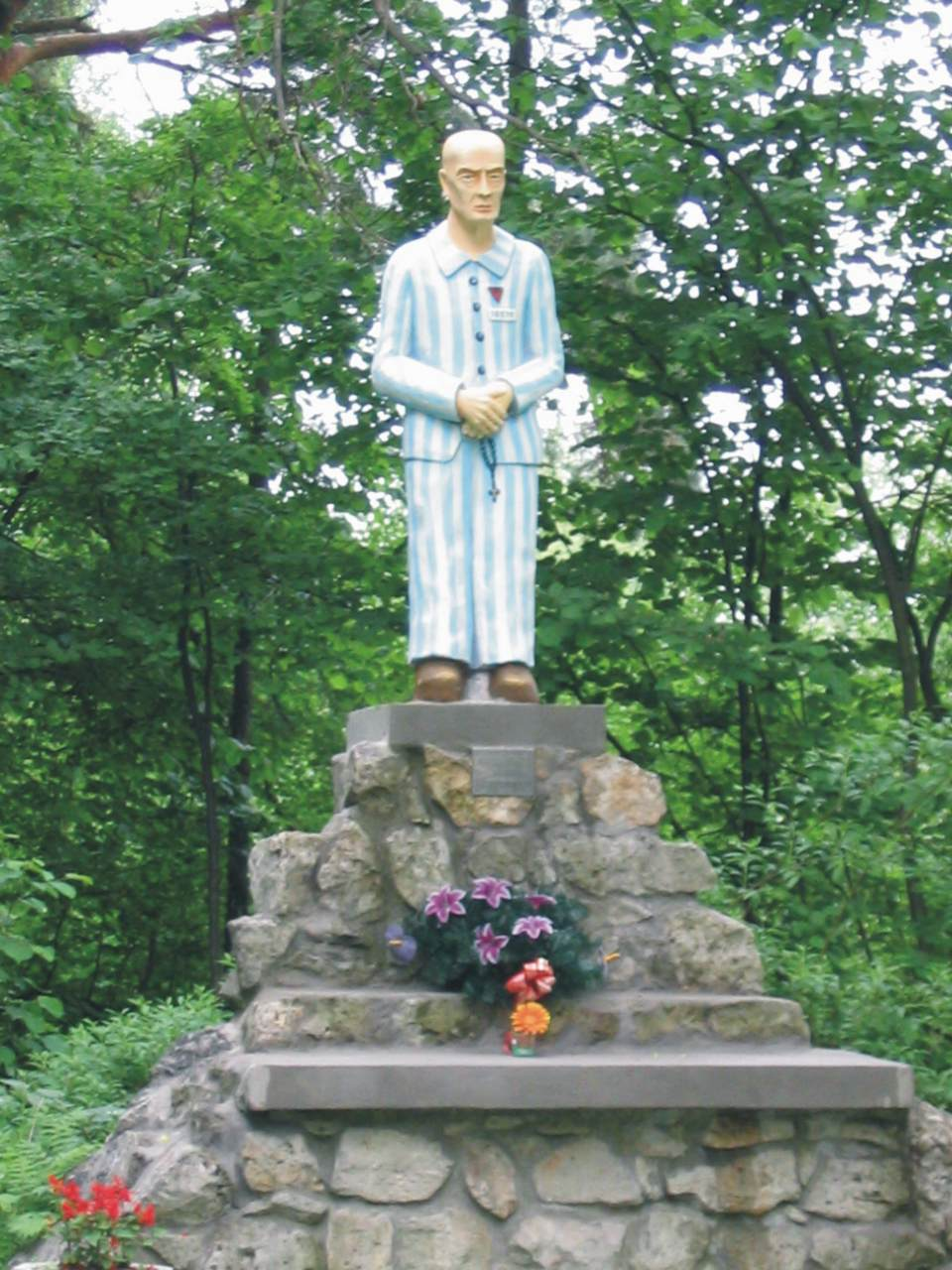 Pomnik św. Maksymiliana Kolbe przy kościele MB Ostrobramskiej w Chrzanowie